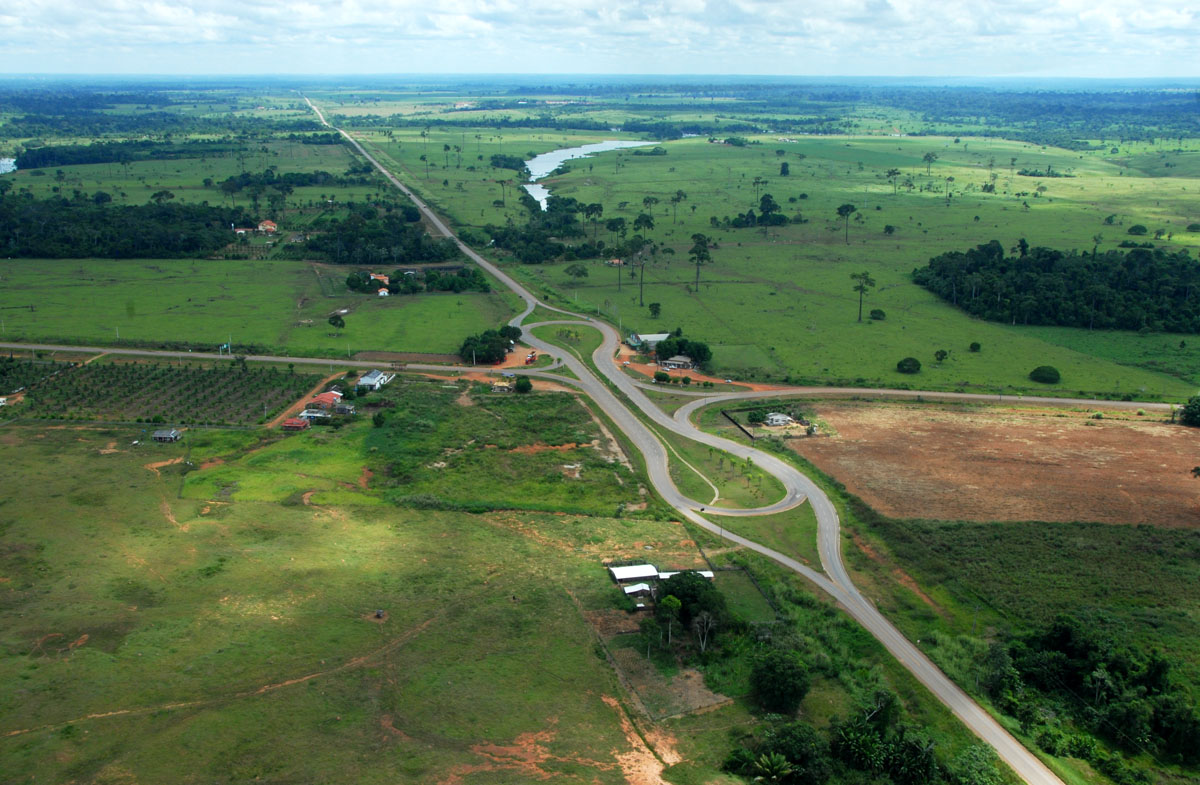 Trevo da Br364